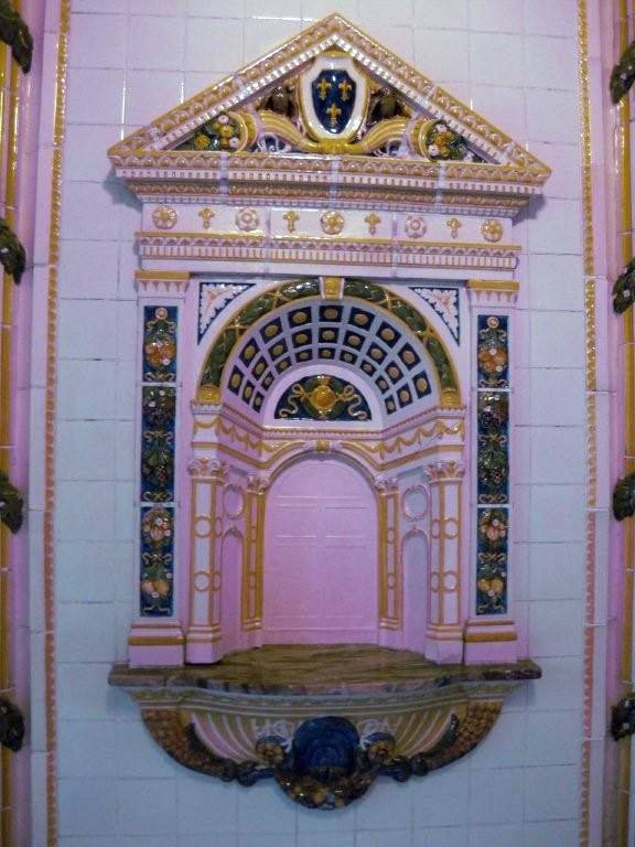 Josef Vinecky, Majolika, 1913, Kaiser-Friedrich-Bad, Wiesbaden